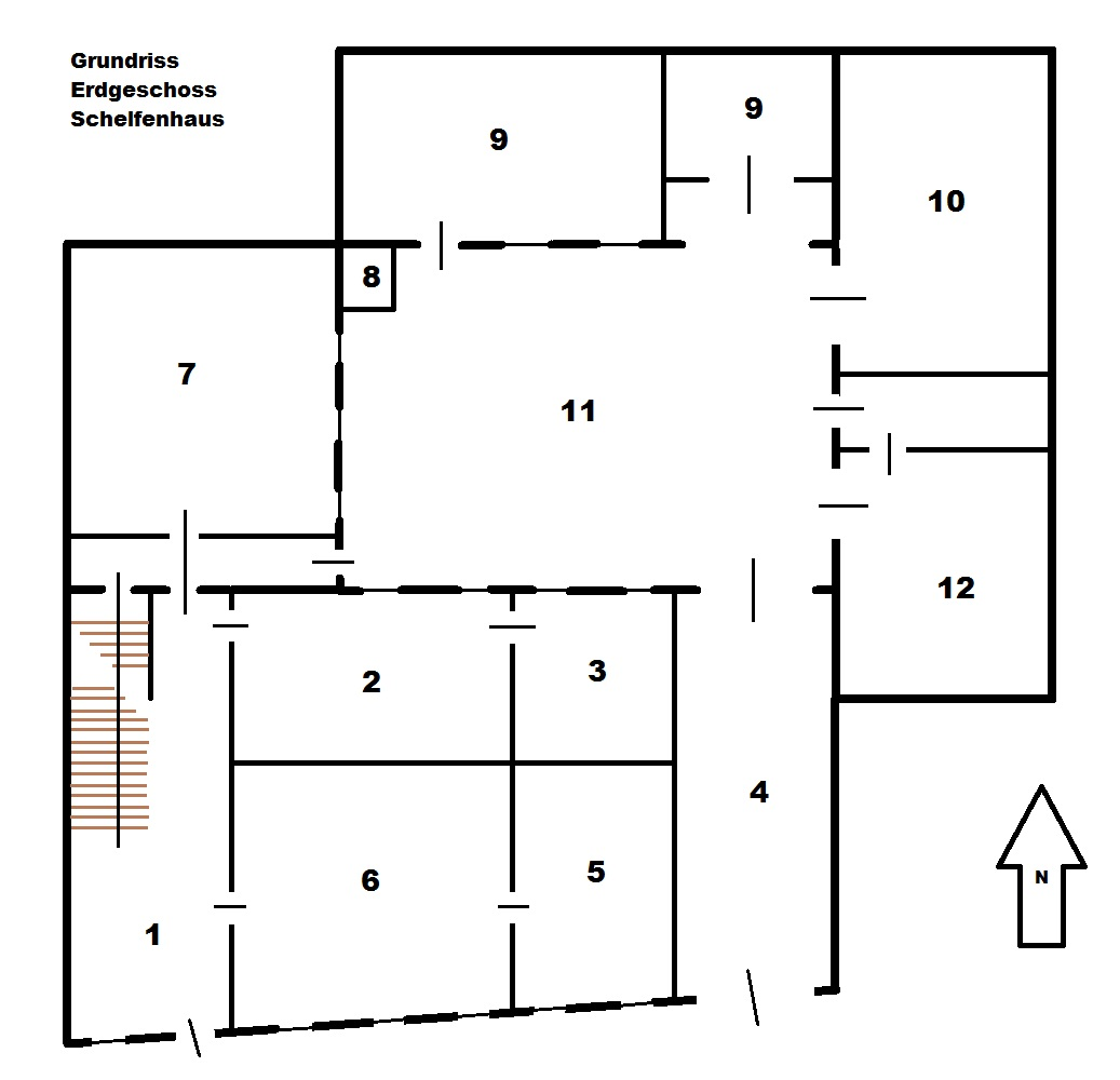 Grundriss Erdgeschoss, Schelfenhaus Volkach. Legende: 1. Hausflur, 2. ehemalige Küche, 3. ehemalige Speisekammer, 4. Durchfahrt, 5. und 6. heutiger Vortragsraum, 7. eventuell ehemaliges Kontor, 8. Anbau, 9. Stallungen, 10. ehemalige Scheune, 11. Innenhof, 12. Kelterraum